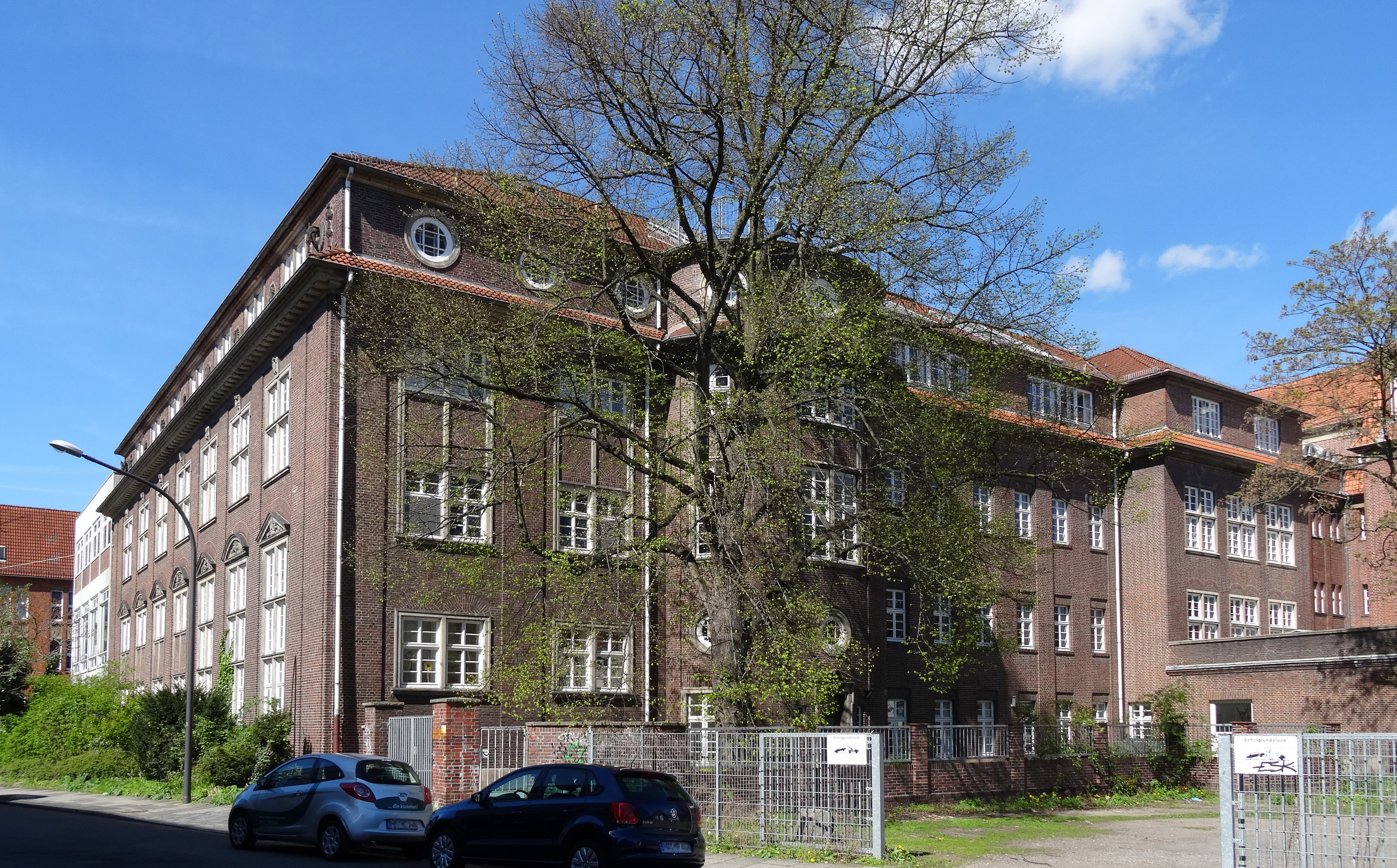 Staatliche Kunstgewerbeschule, Hochschule für Künste in Bremen, Am Wandrahm 23Das abgebildete Objekt ist ein geschütztes Kulturdenkmal in der Freien Hansestadt Bremen, mit der Nr. 1219 beim Landesamt für Denkmalpflege registriert.